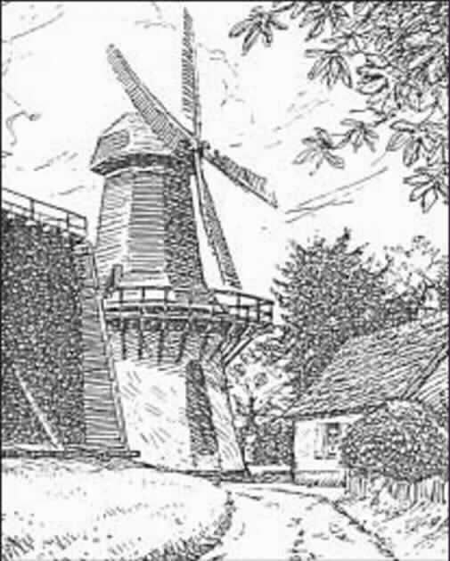 Gradierwerk am Friedrichsborn nebst Windpumpe mit Windrad